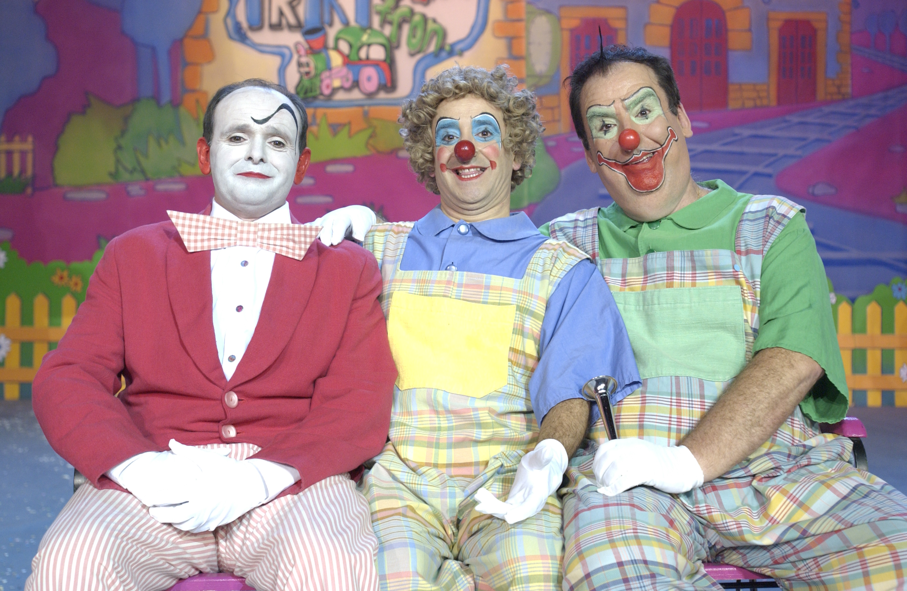 'Trikitraka trikitron'